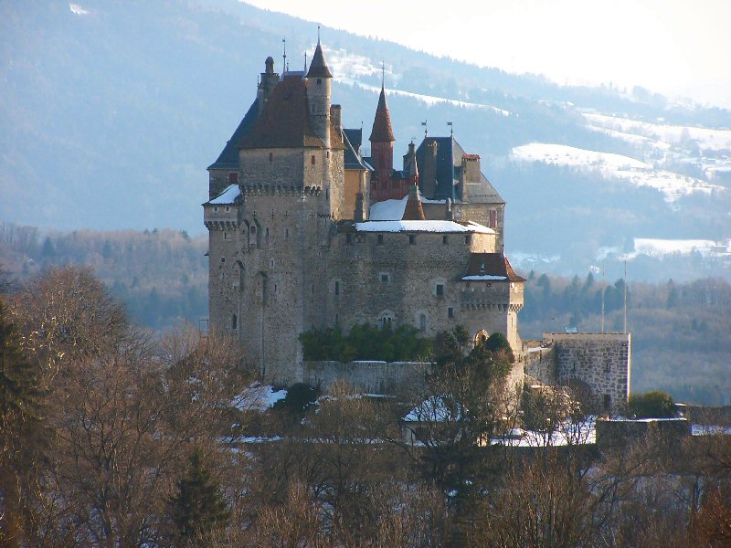 Photo du chateau de Menthon-Saint-Bernard